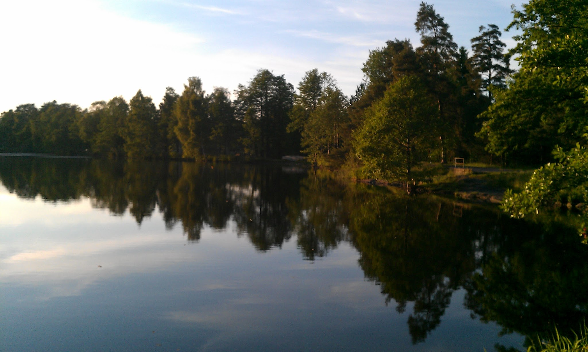 Bugårdsdammen i Sandefjord